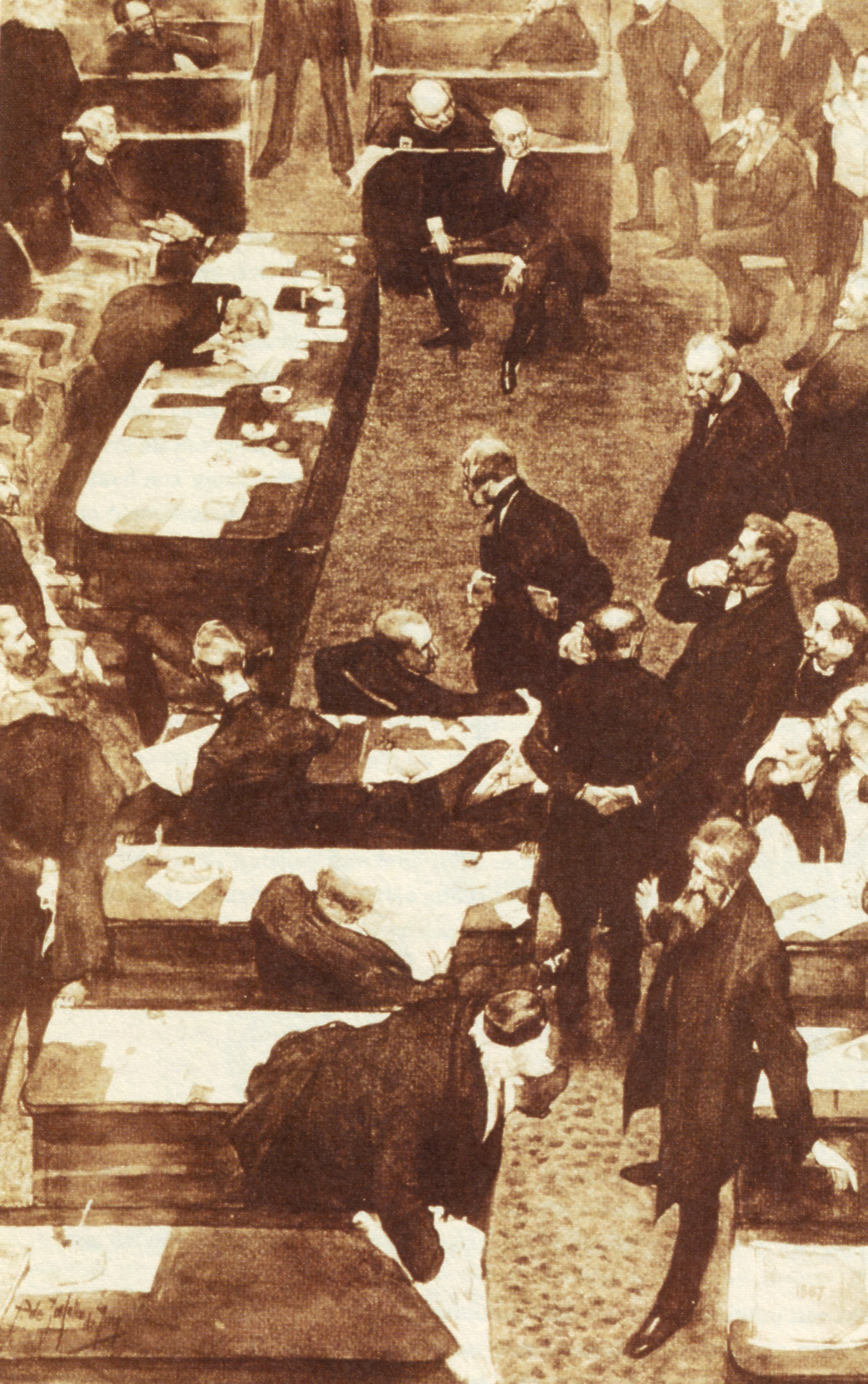 Kamer behandelt grondwetsherziening, 1887